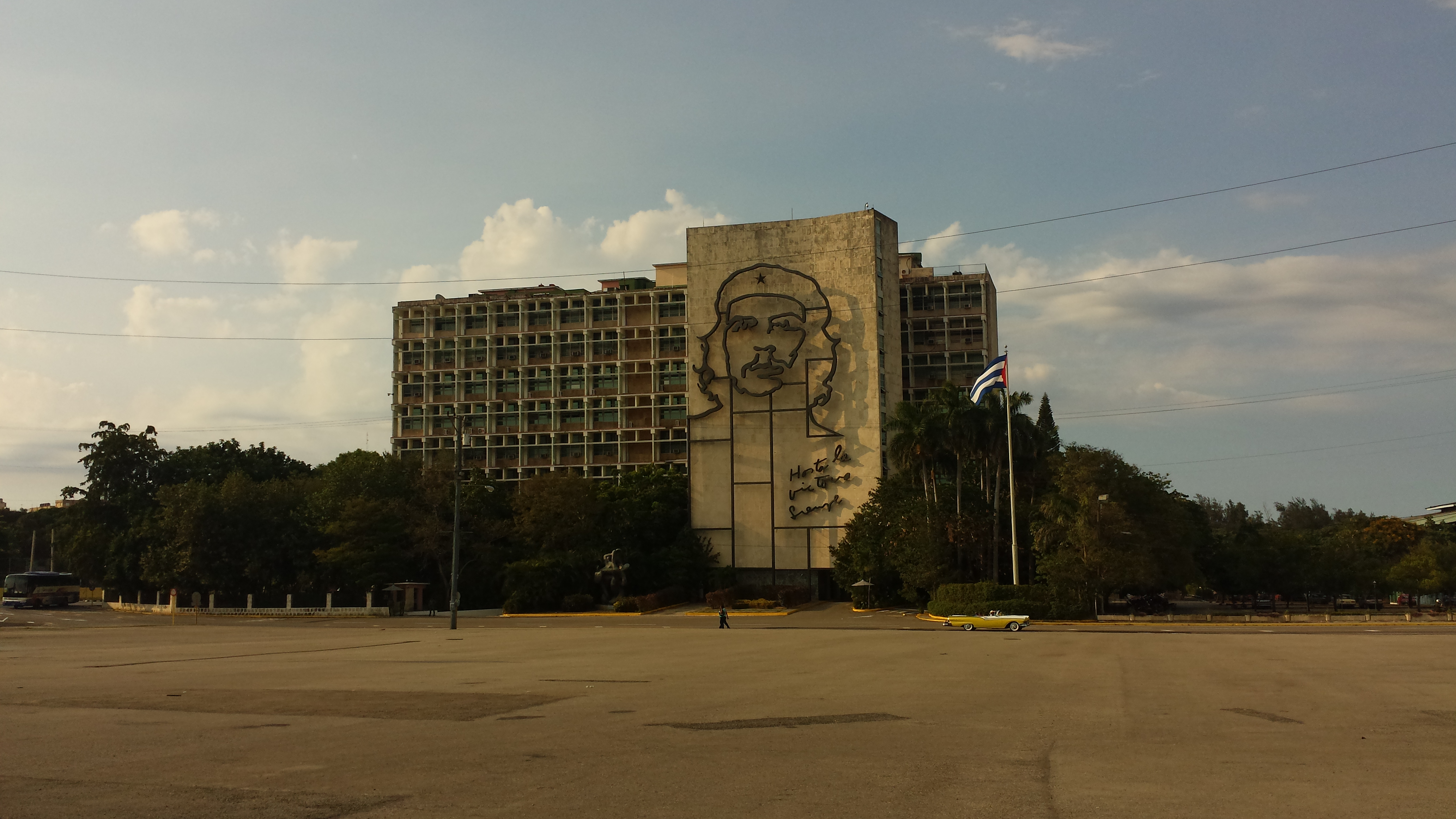 Sede principal del Ministerio del Interior, con el hermoso Monumento a Ernesto Che Guevara